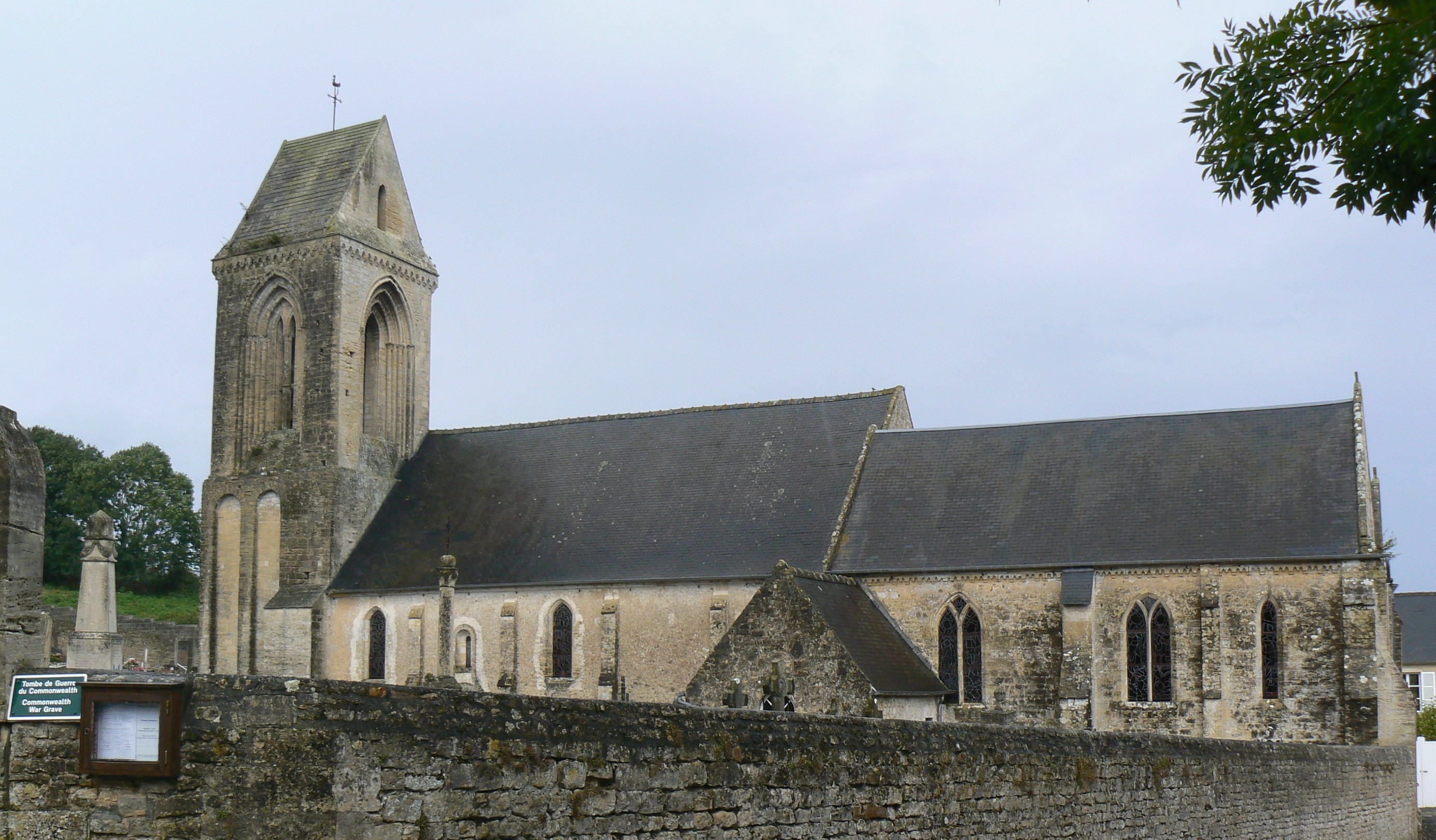 Église de Sainte-Honorine-des-Pertes (14)